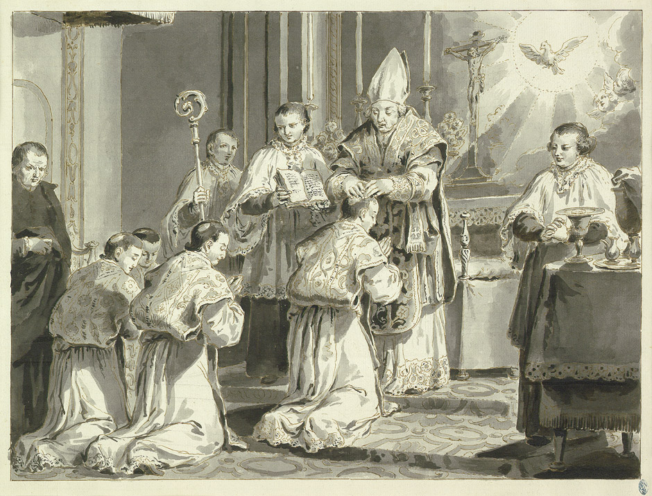 Priesterweihe, aus einer Serie der sieben Sakramente: Federzeichnung, ca. 38,5 x 52,5 cm; hergestellt im Auftrag von Padre Ghedini